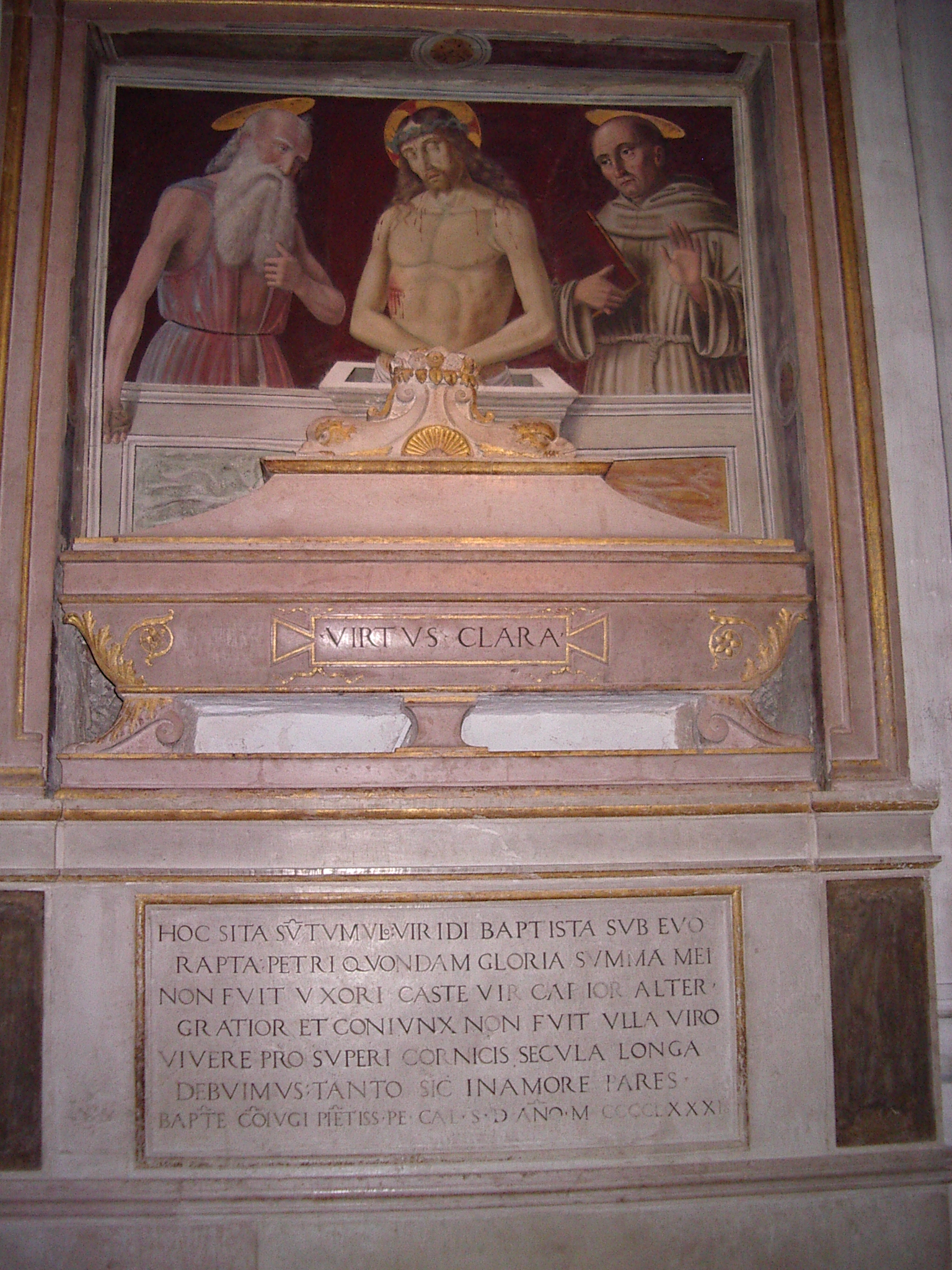 'Christ dans le Sarcophage entre Saint Jérôme et Saint Bonaventure', Église Saint Dominique, Cagli, Marches